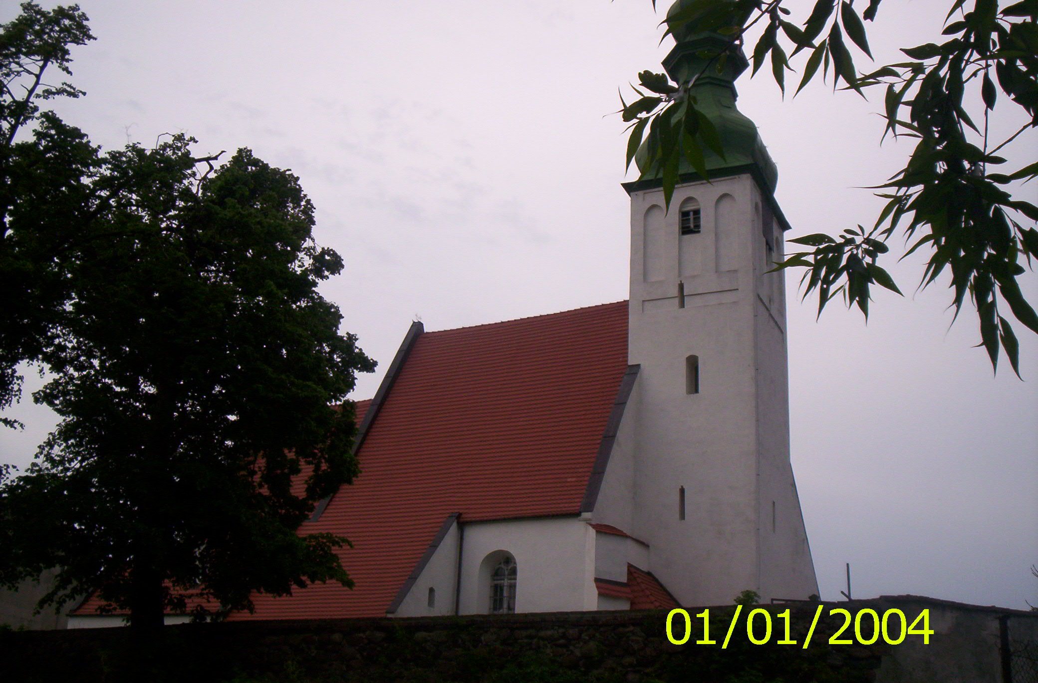 Kościół pod wezwaniem św. Michała Archanioła w Kwielicach, z fragmentem szesnastowiecznego muru